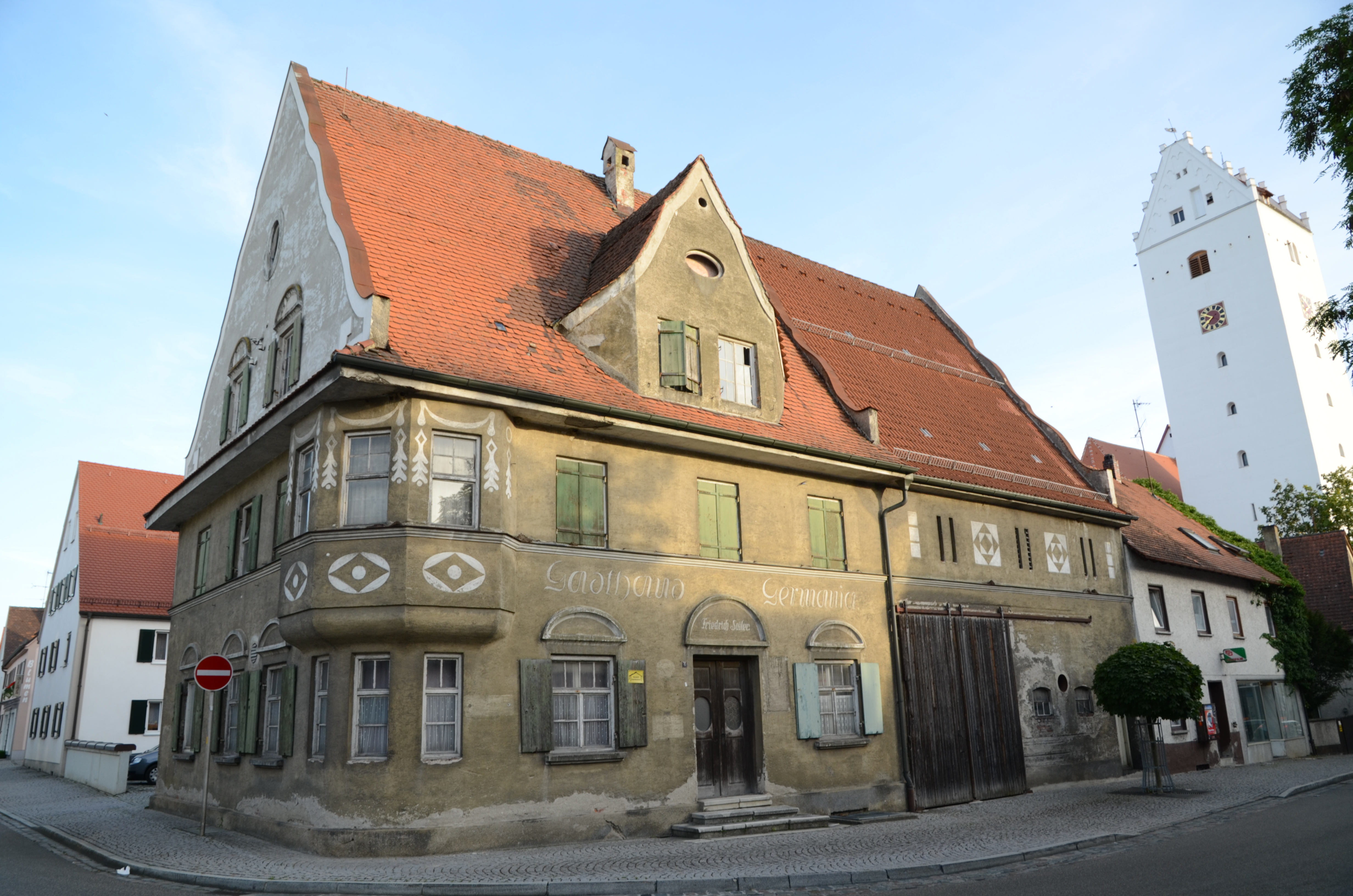 Leipheim Kirchgasse 6 Gasthaus Germania